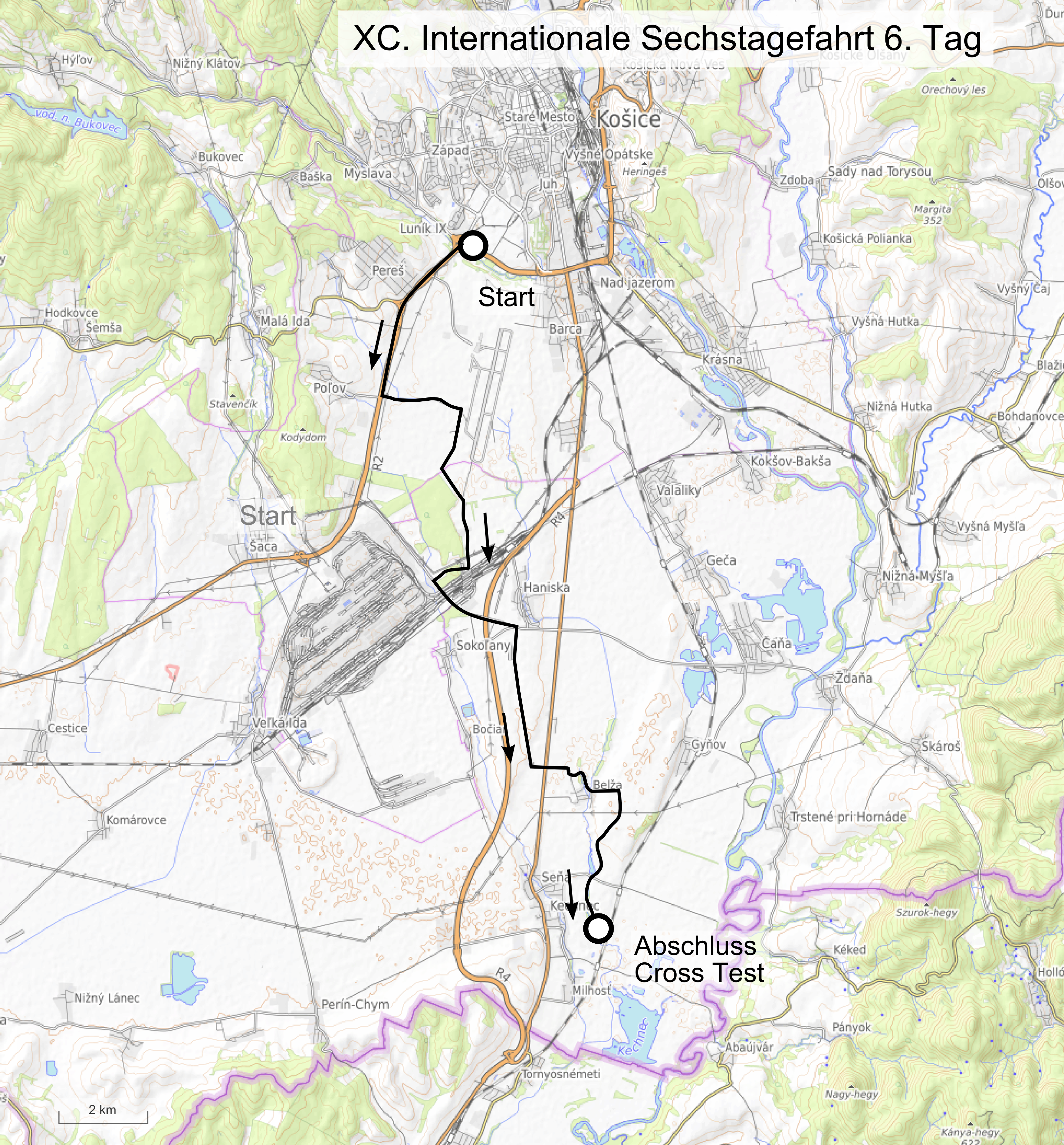 Karte der 90. Internationale Sechstagefahrt, Route des 6. Tages